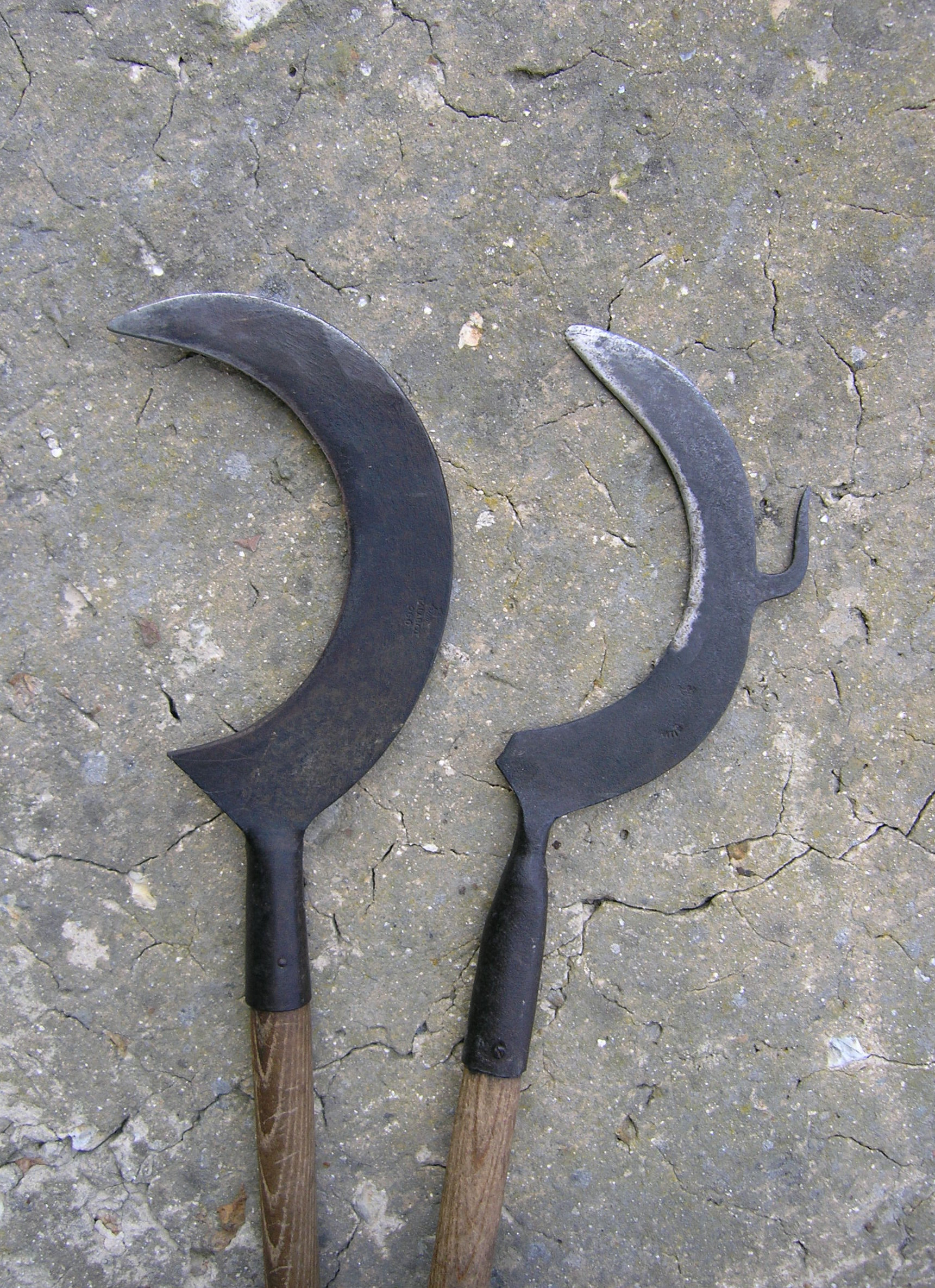 Deux modèles de croissant : outil agricole manuel servant à élaguer ou à débroussailler.